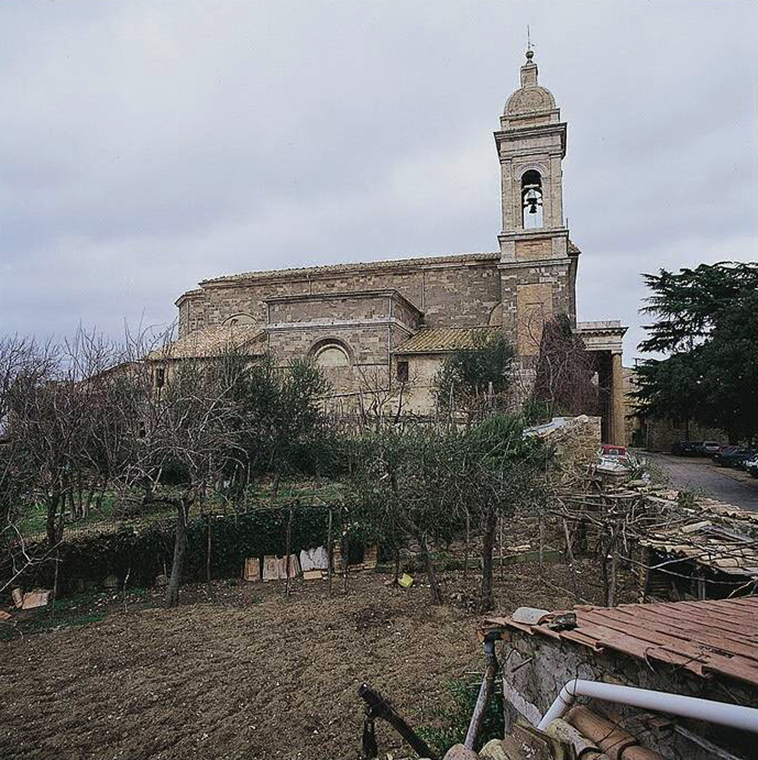 Vue de la cathédrale de Montalcino